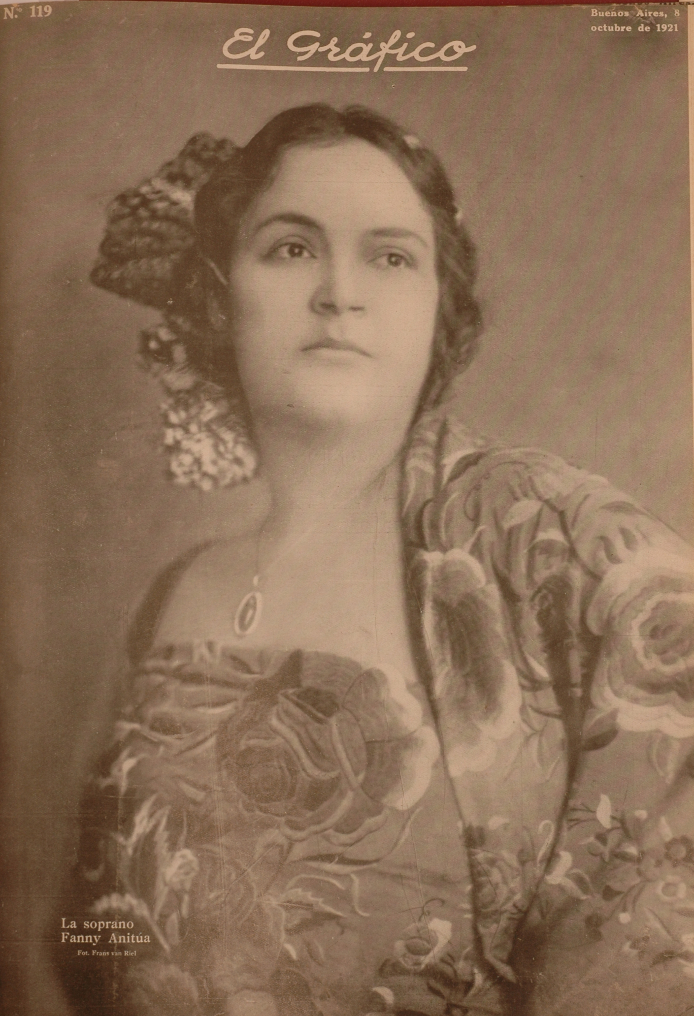 El Grafico del 08 de Octubre de 1921. Edicion 119